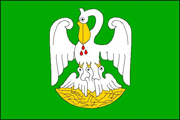 Česky: vlajka obce Vilémov